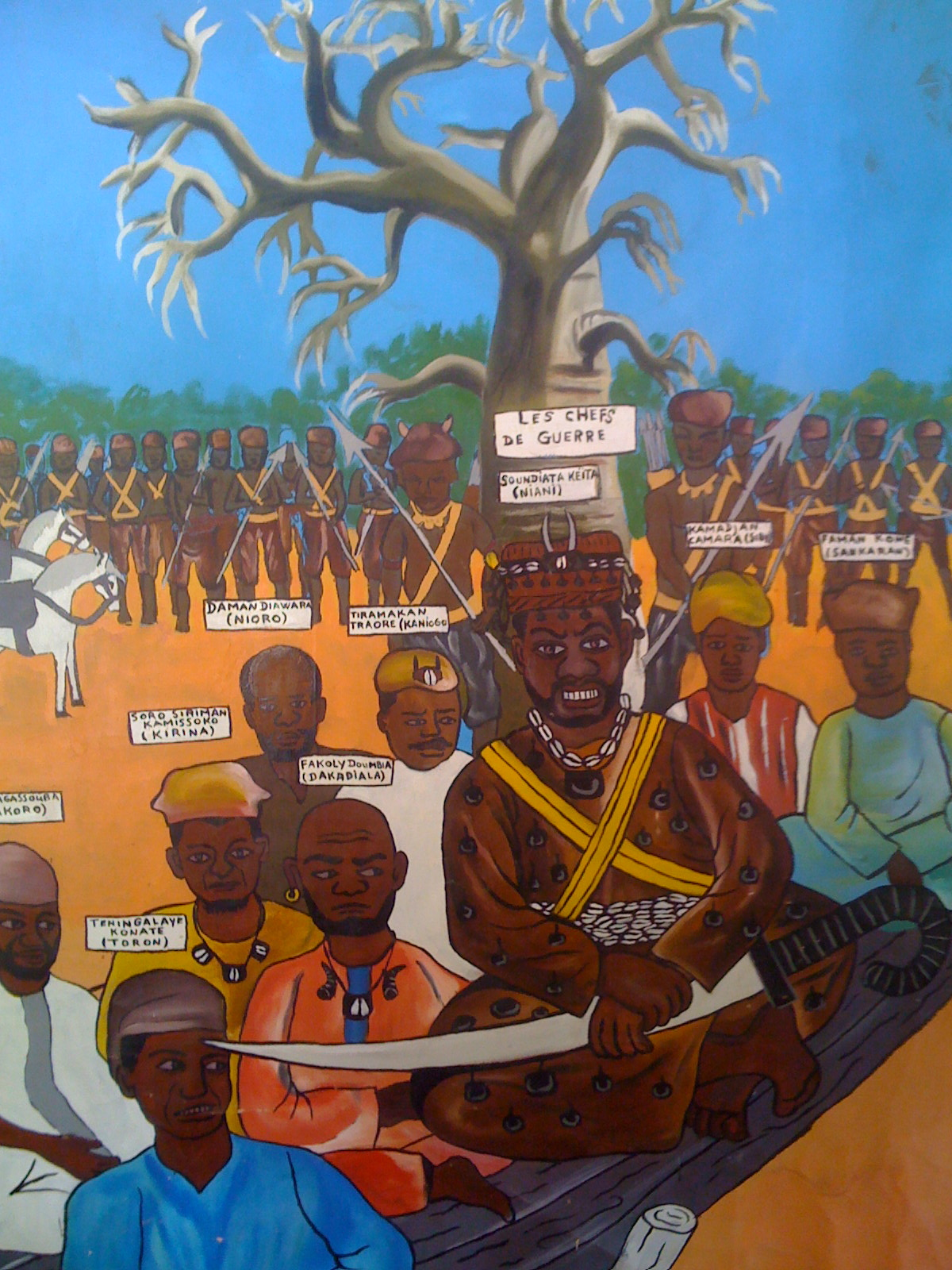 les chefs de guerre